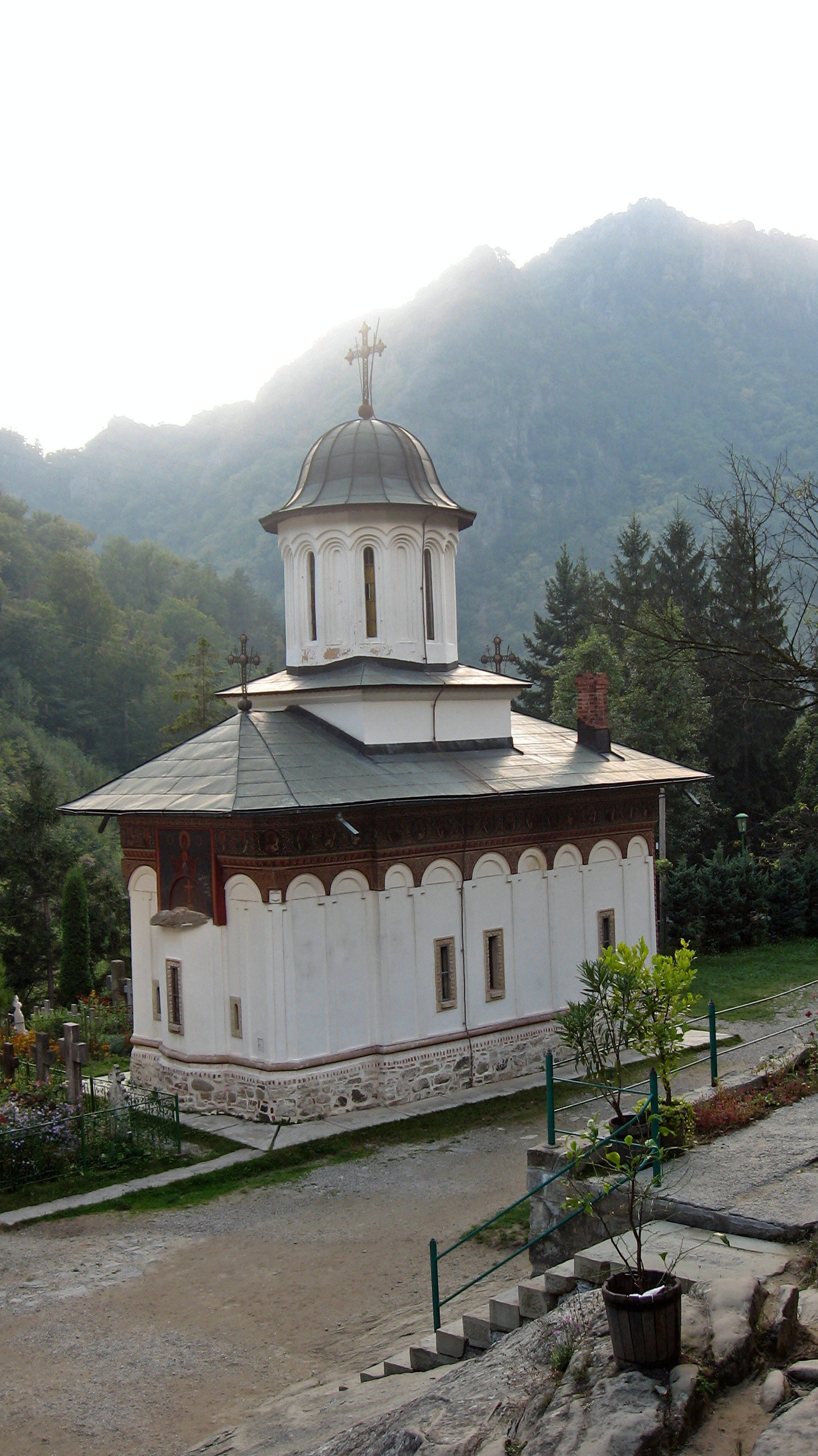 Mănăstirea Turnu, Biserica "Intrarea în Biserică" 01